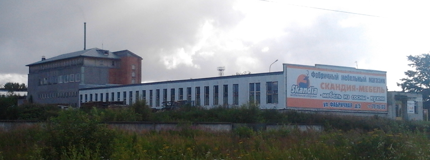 Промышленность Петрозаводска